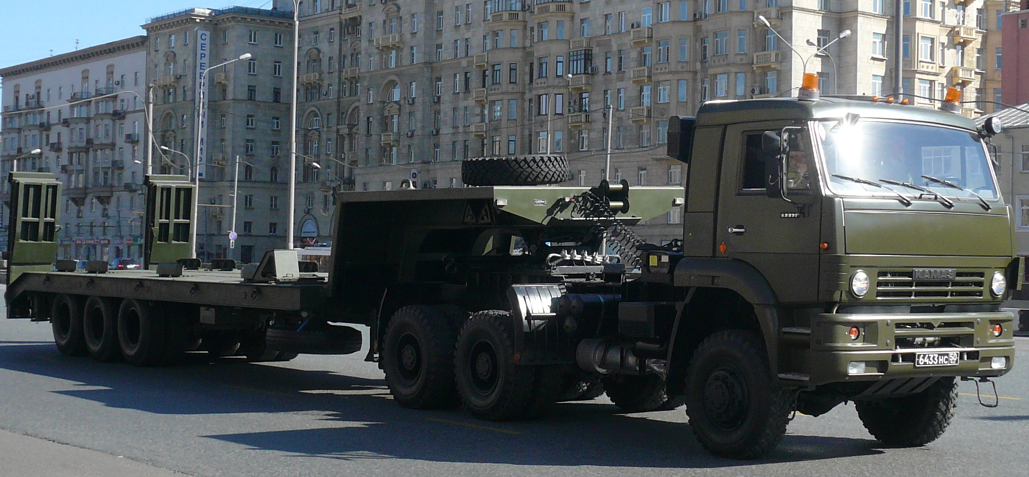 Военный российский автомобиль на шасси КАМАЗа.